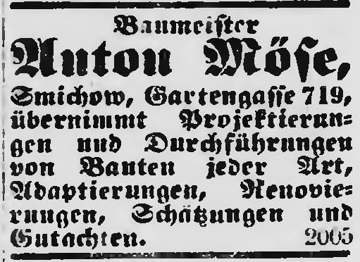 Inzerát firmy Anton Möse, Praha-Smíchov1905